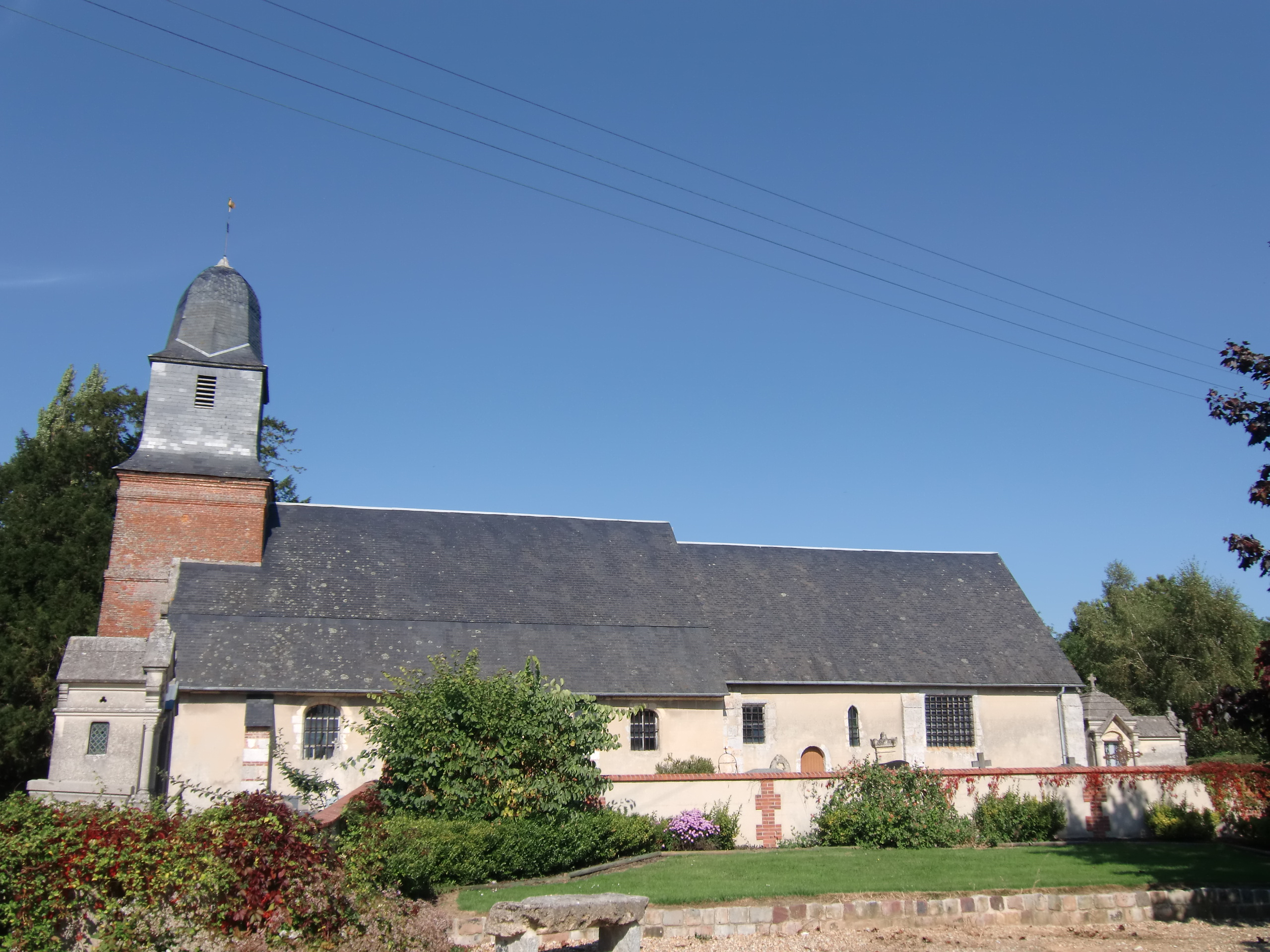 église de Boulleville (Eure, Normandie, France)